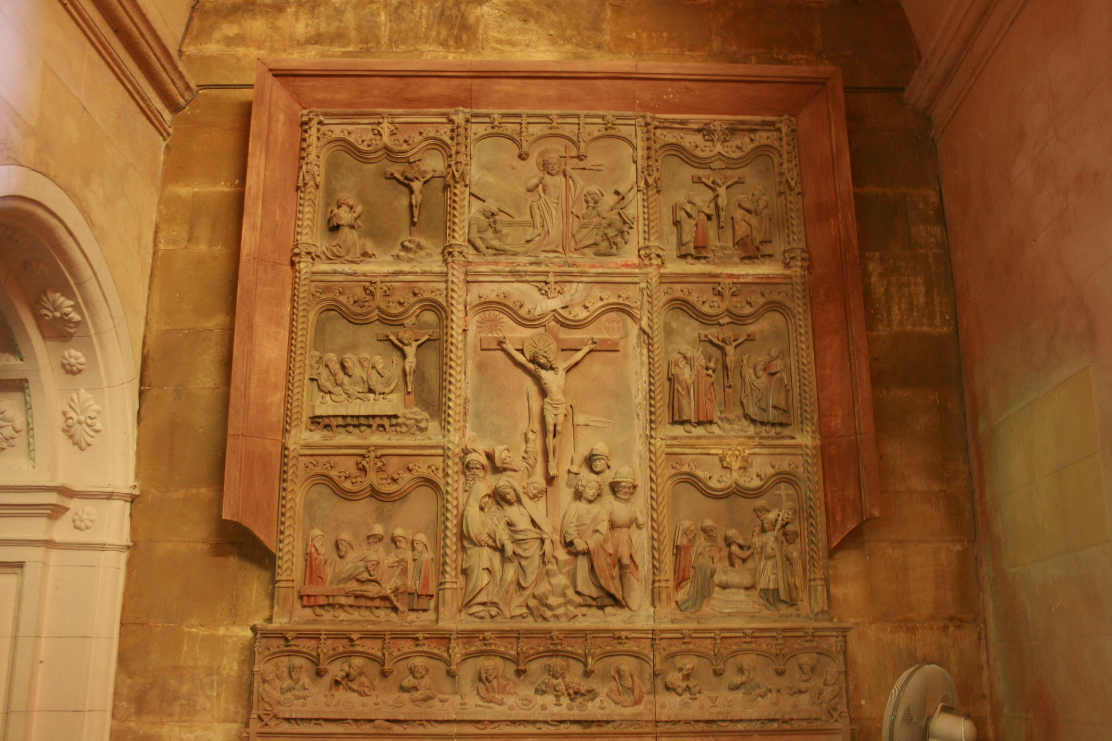 Passio imaginis de Santuari de Sant Salvador in Felanitx